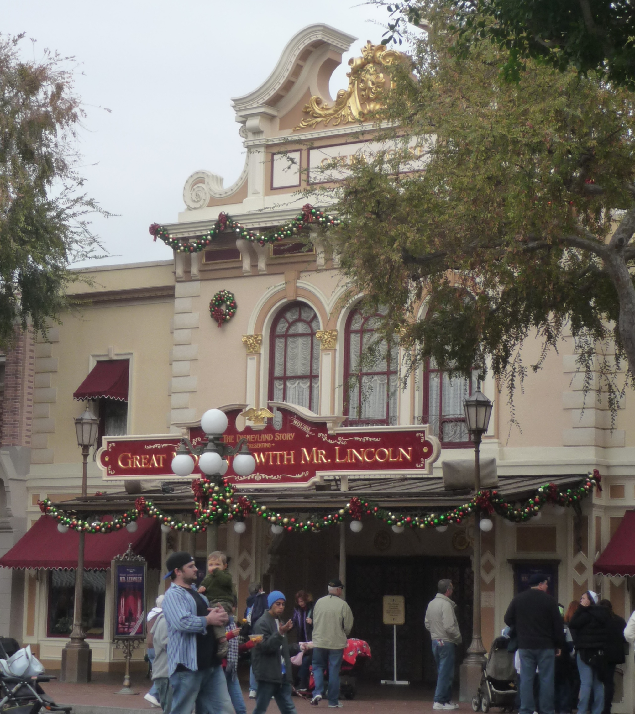 Disneyland 12-11-2009 (124)